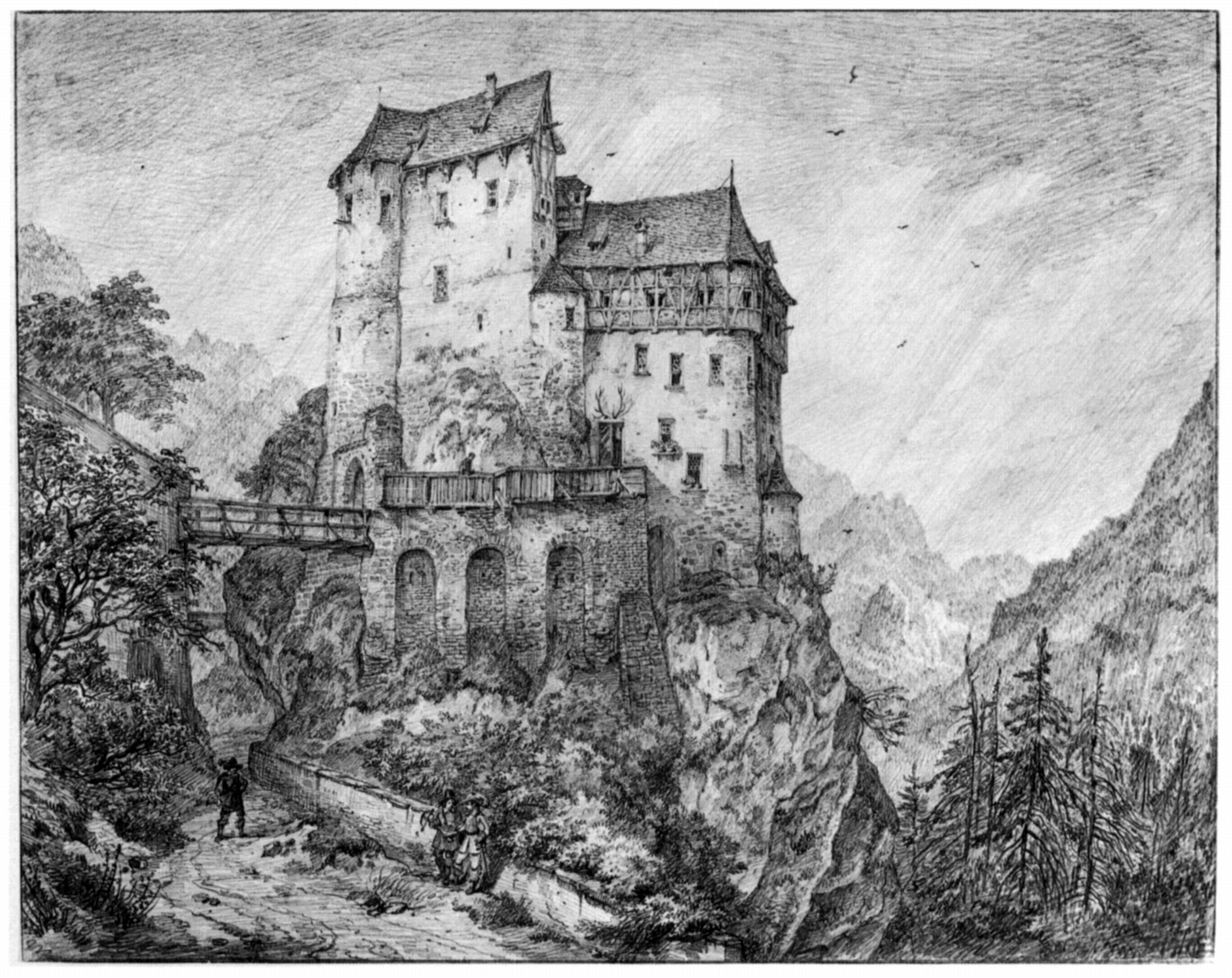 Burg Gaillenreuth - Vorzeichnung für: »Sammlung malerischer Burgen und anderer merkwürdiger Baudenkmale der Bayerischen Vorzeit«, lithographiert von Karl August Lebschée, gedruckt bei Mey und Widmayer, München 1844